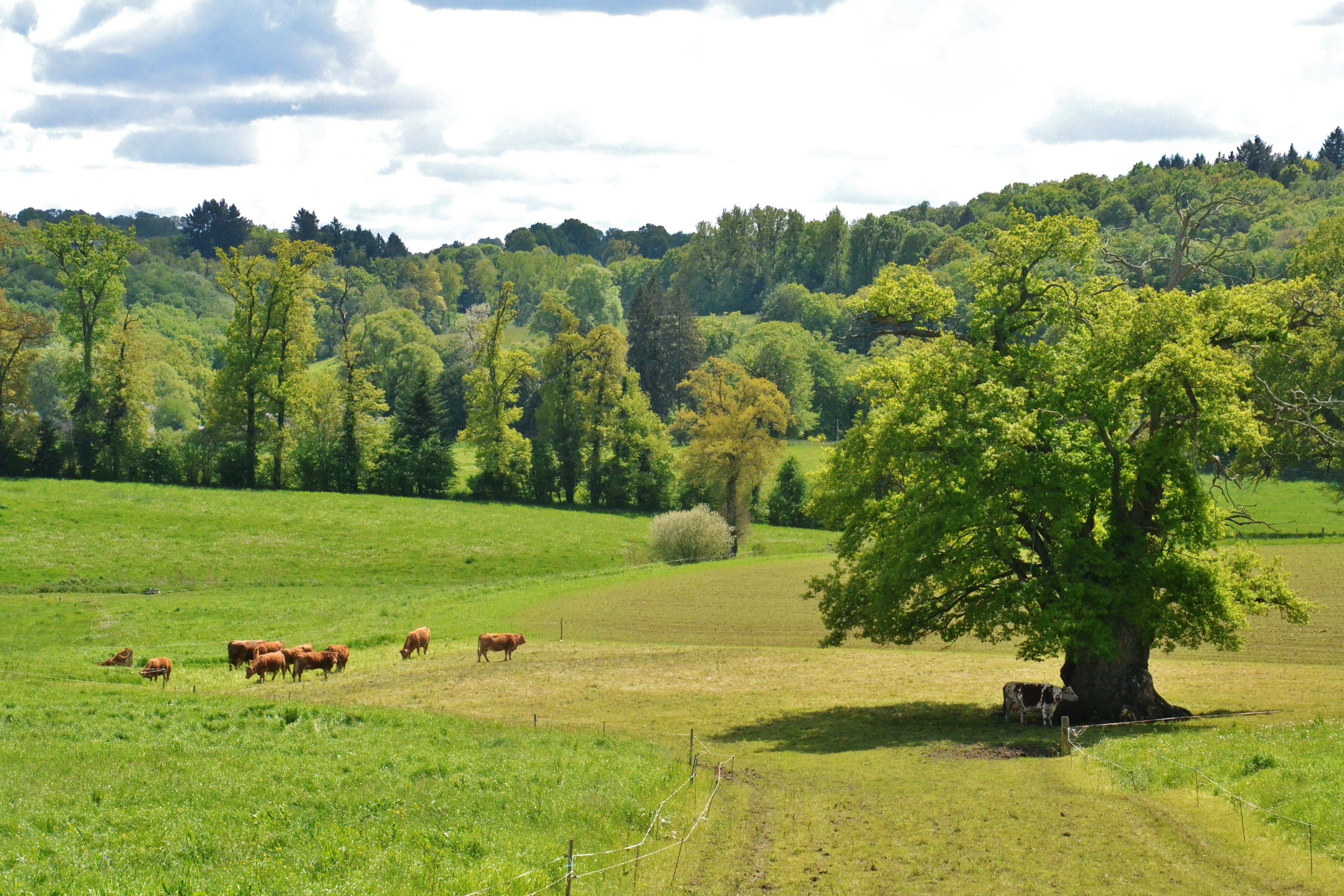 La campagne près de Chamboulive (Corrèze, France)